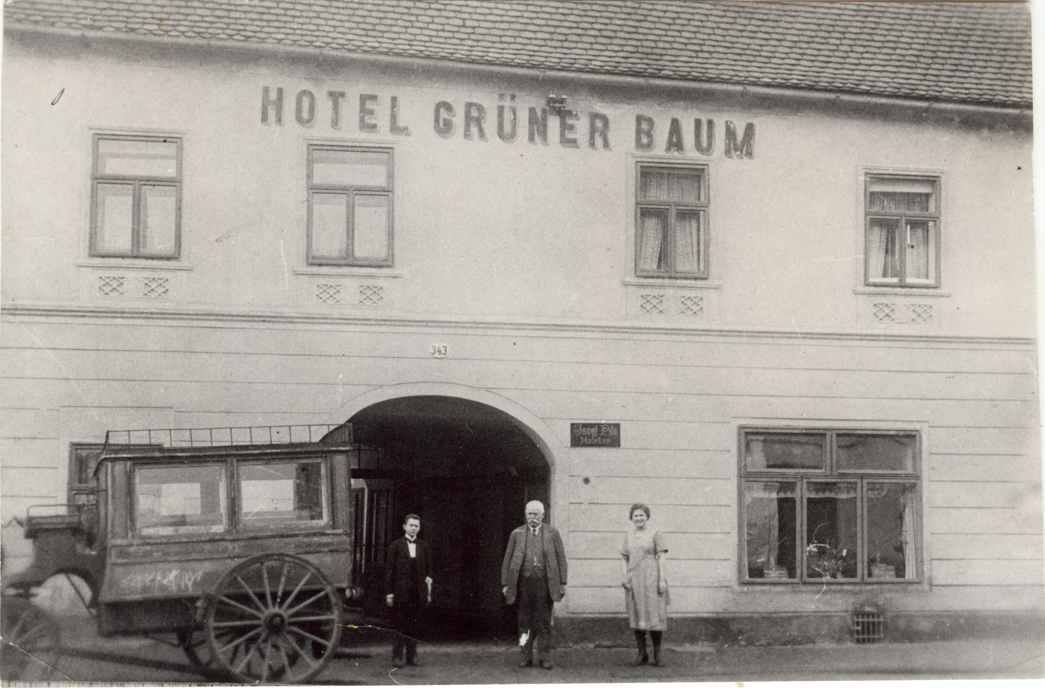 čelní pohled na historickou budovu hotelu Zelený strom v Kadani